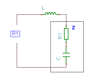 Sisendreaktiivsuse kompenseerimine jada. Tehtud TinaSpice'i abiga.